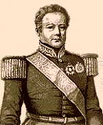 Retrato de Francisco José de Sousa Soares de Andrea.